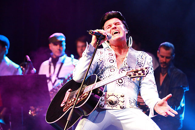 Bühnenfoto